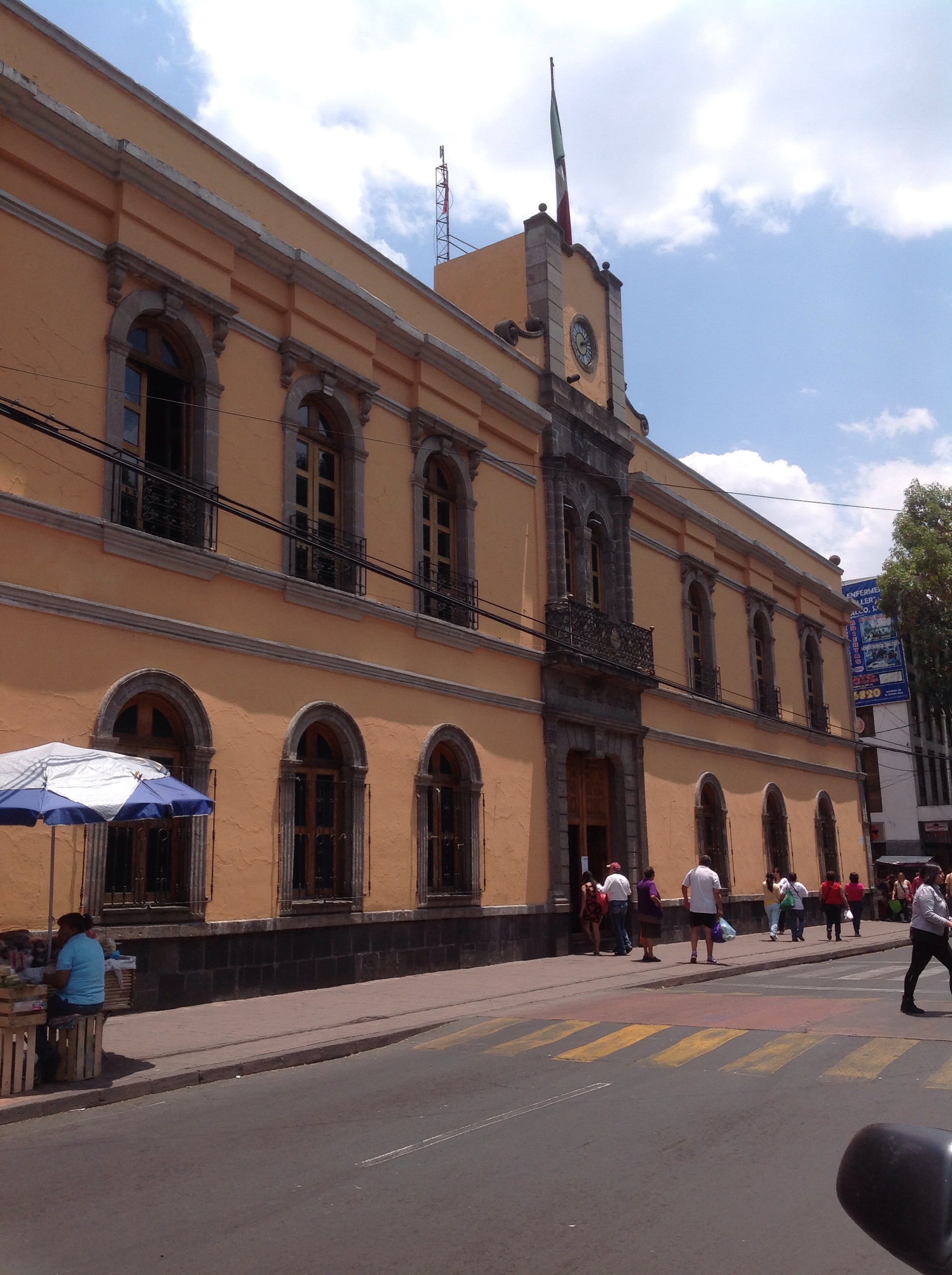 Recinto de arte y cultura